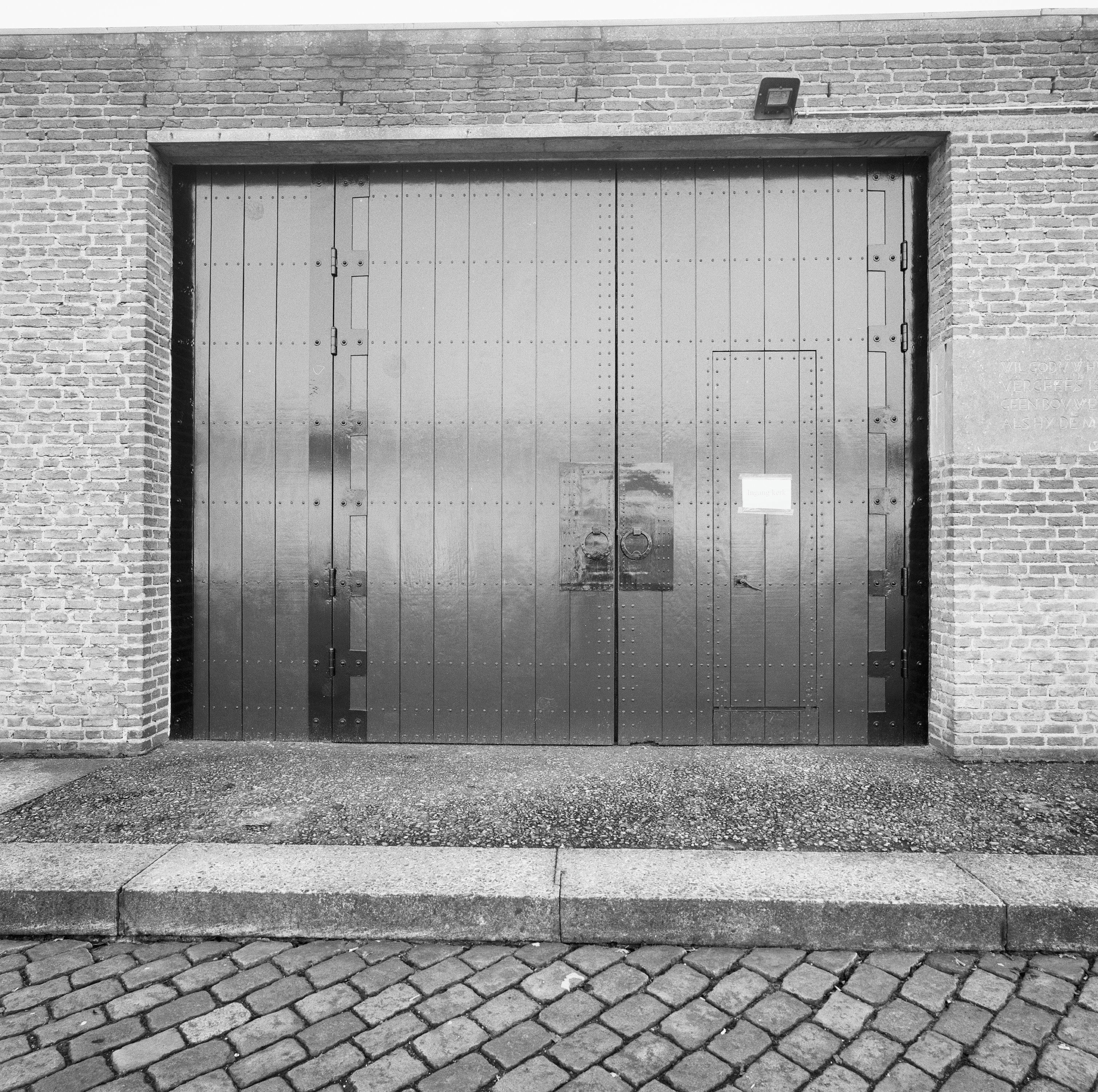 Sint Andrieskerk: Overzicht hoofddeur, ingang kerk